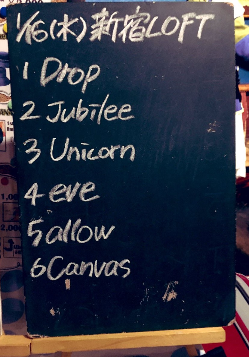 amiinAセトリボード(20190116(1))